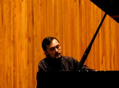 Presentación de De Profundis